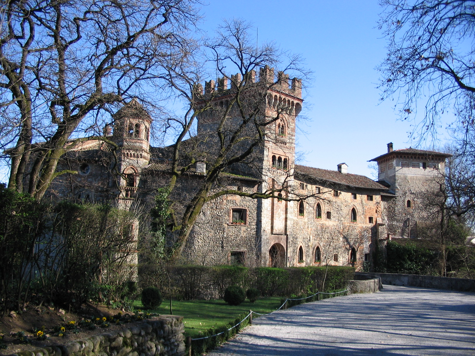 Autore Giorces. Filago castello di Marne, BG.